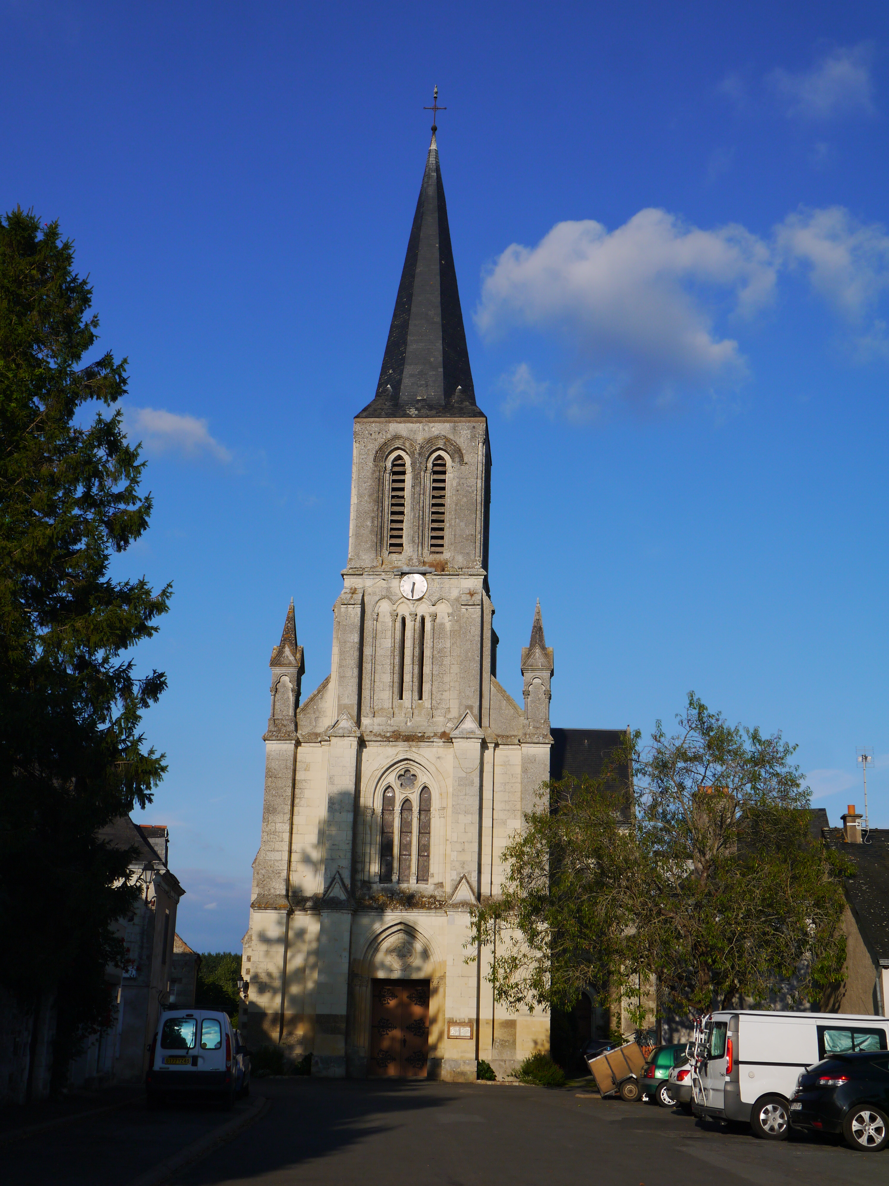 L'église Notre-Dame en 2016.